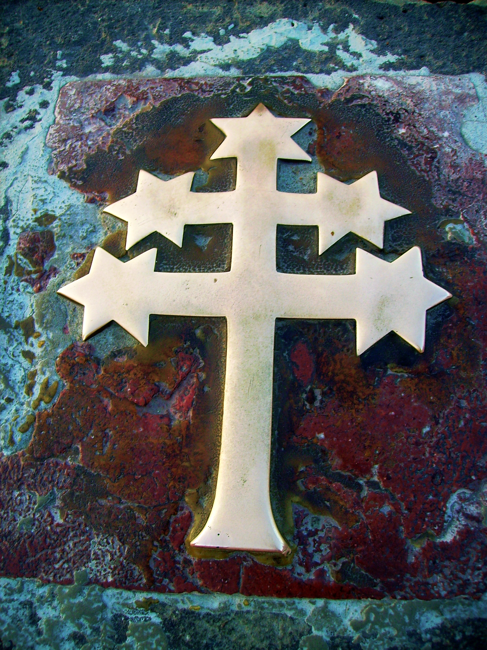 Stelle auf der Karlsbrücke, an der Johannes Nepomuk ertränkt wurde.